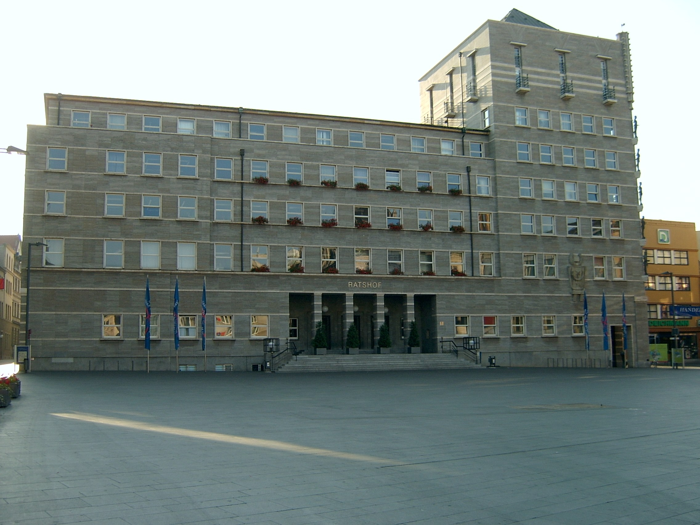 Der Ratshof in Halle (Saale).